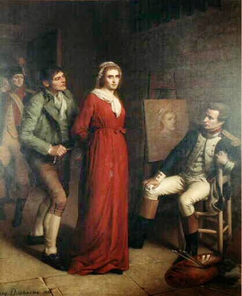 Signé et daté en bas à gauche. Le portrait par Hauer est conservé au musée de Versailles.